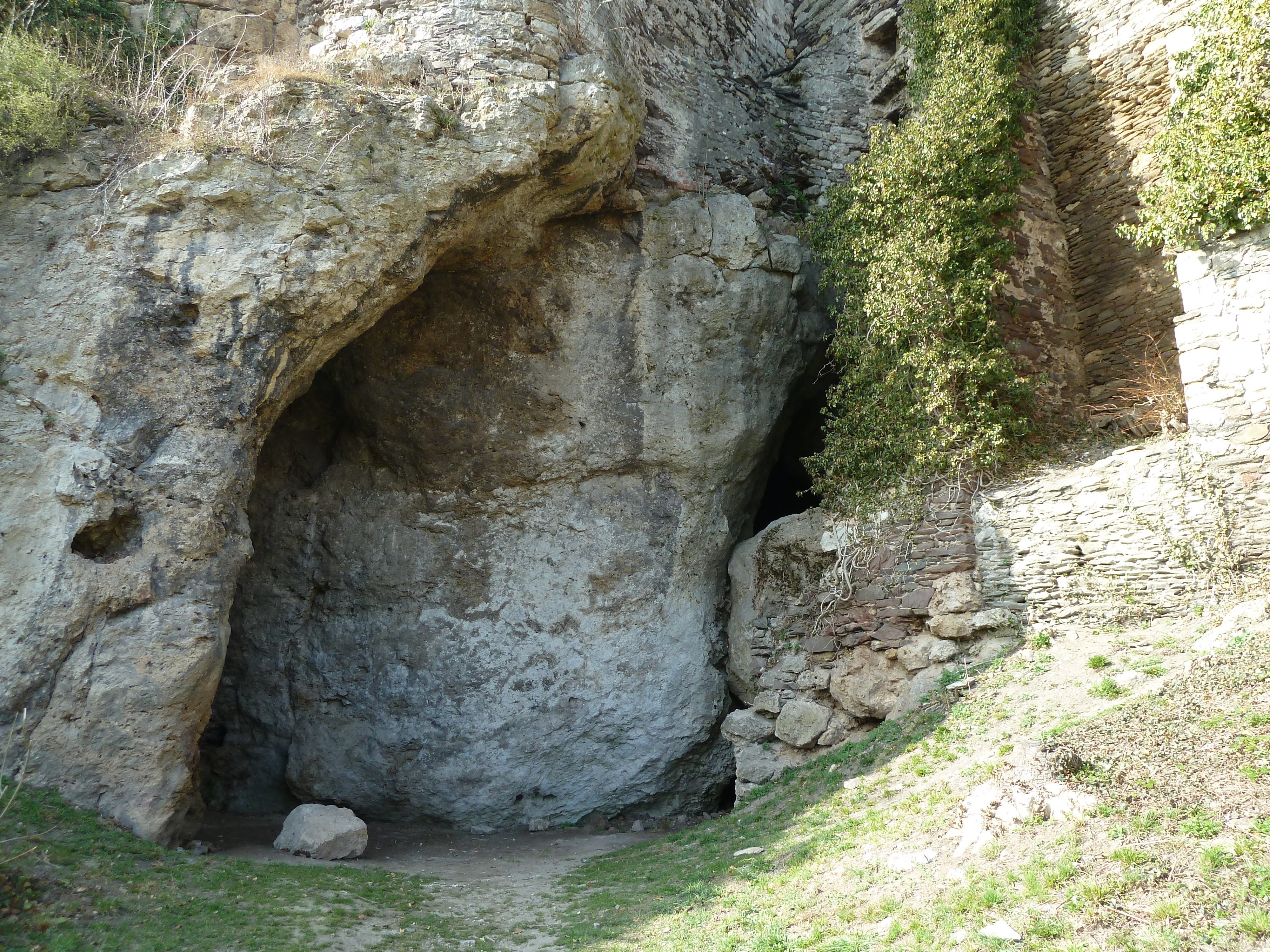 Ilsenhöhle: Zugang zur Nord- (rechts) und Südhöhle (links)